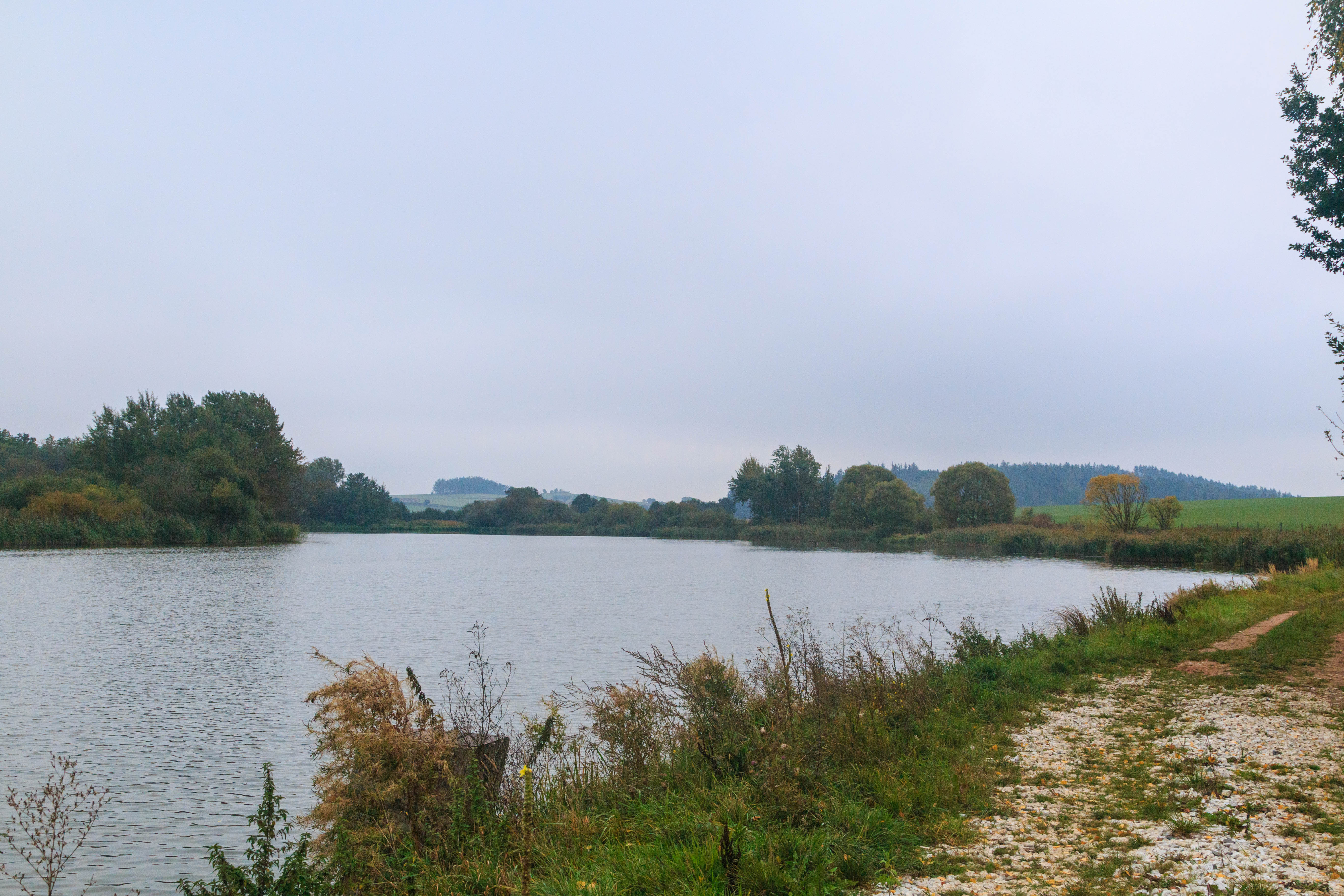 Starý Čekanický rybník Project: Vodstvo.